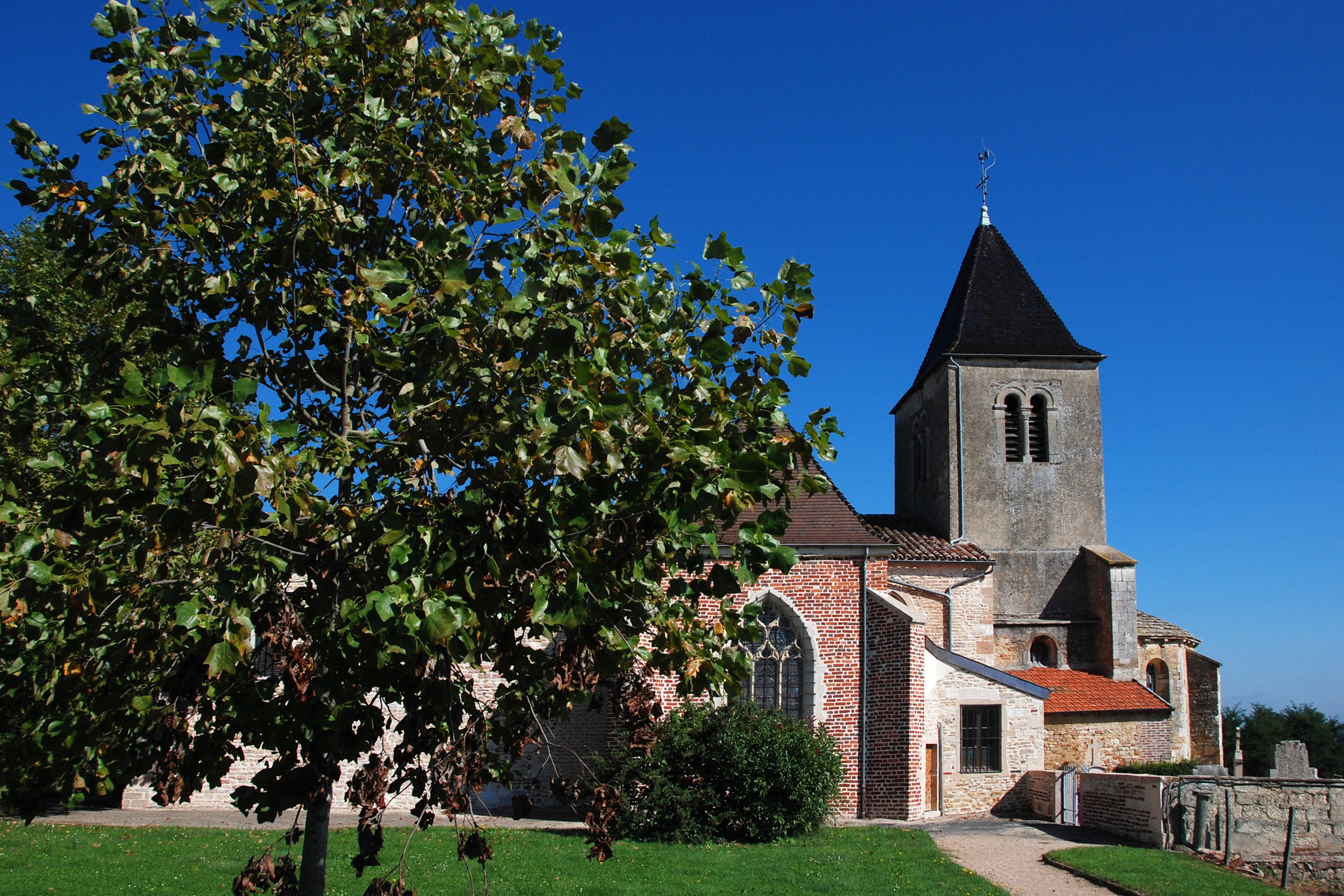 Église Notre-Dame-de-Pitié, (Inscrit, 1947) .